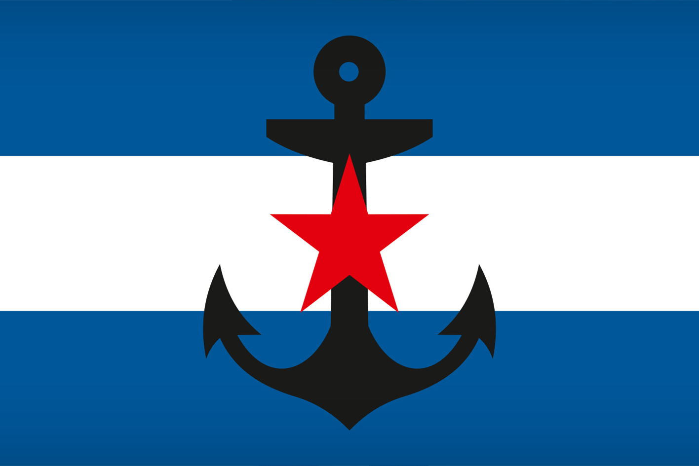 Кормовой флаг морских и речных судов Осоавиахима утвержден Постановлением СНК СССР от 18 июля 1940 года (постановление № 1290; Сб. постановлений и распоряжений СМ СССР 1949 г., № 21, ст. 517) Кормовой флаг для всех судов Осоавиахима представляет собой полотнище синего цвета с белой горизонтальной полосой посредине, шириной в1/3ширины флага. В центре флага изображен якорь черного цвета, на веретене которого изображена пятиконечная звезда красного цвета. Использованы материалы книги В.А.Соколова "Флаги Российской империи и СССР в документах", М, 2001